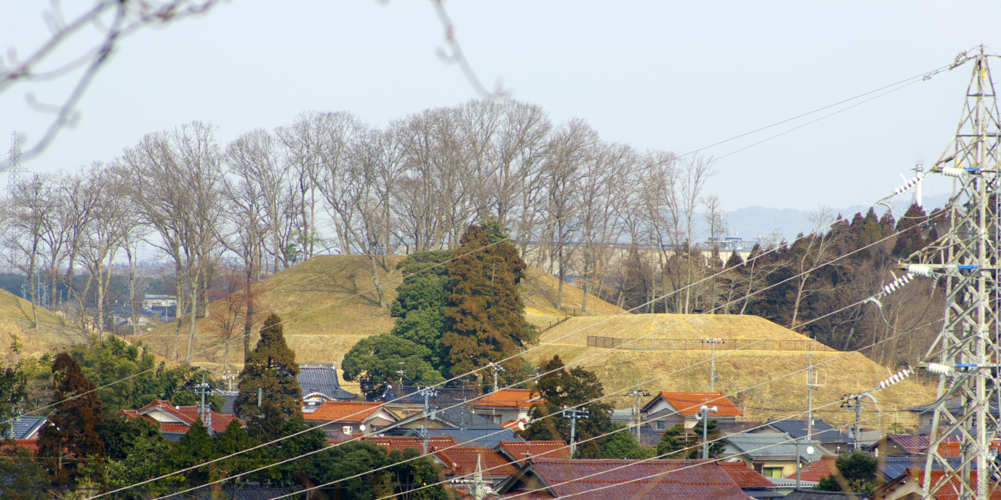 和田山5号墳から見た秋常山1号墳。石川県能美市。